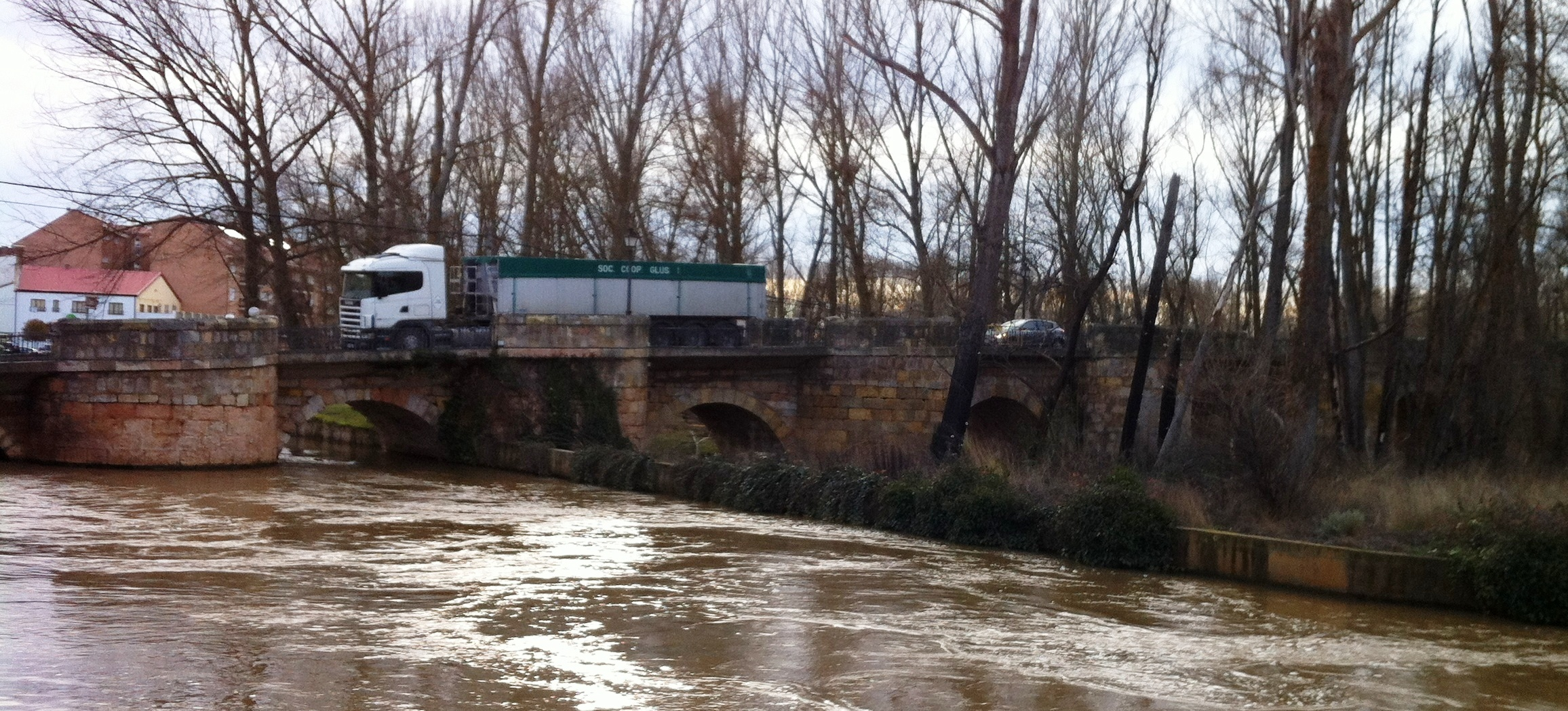 Puente sobre el río Duero